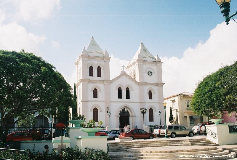 Está localizada en el pueblo más alto de la isla con 2,000 pies sobre el nivel del mar. La Parroquia San José ha sido delclarado un monumento histórico nacional y la misma fue construida en 1887. Es de estilo gótico con un altar hecho de madera y yeso y laminado en oro. Fue la última parroquia construida en Puerto Rico bajo el dominio de los españoles. Para más información sobre Aibonito visite a